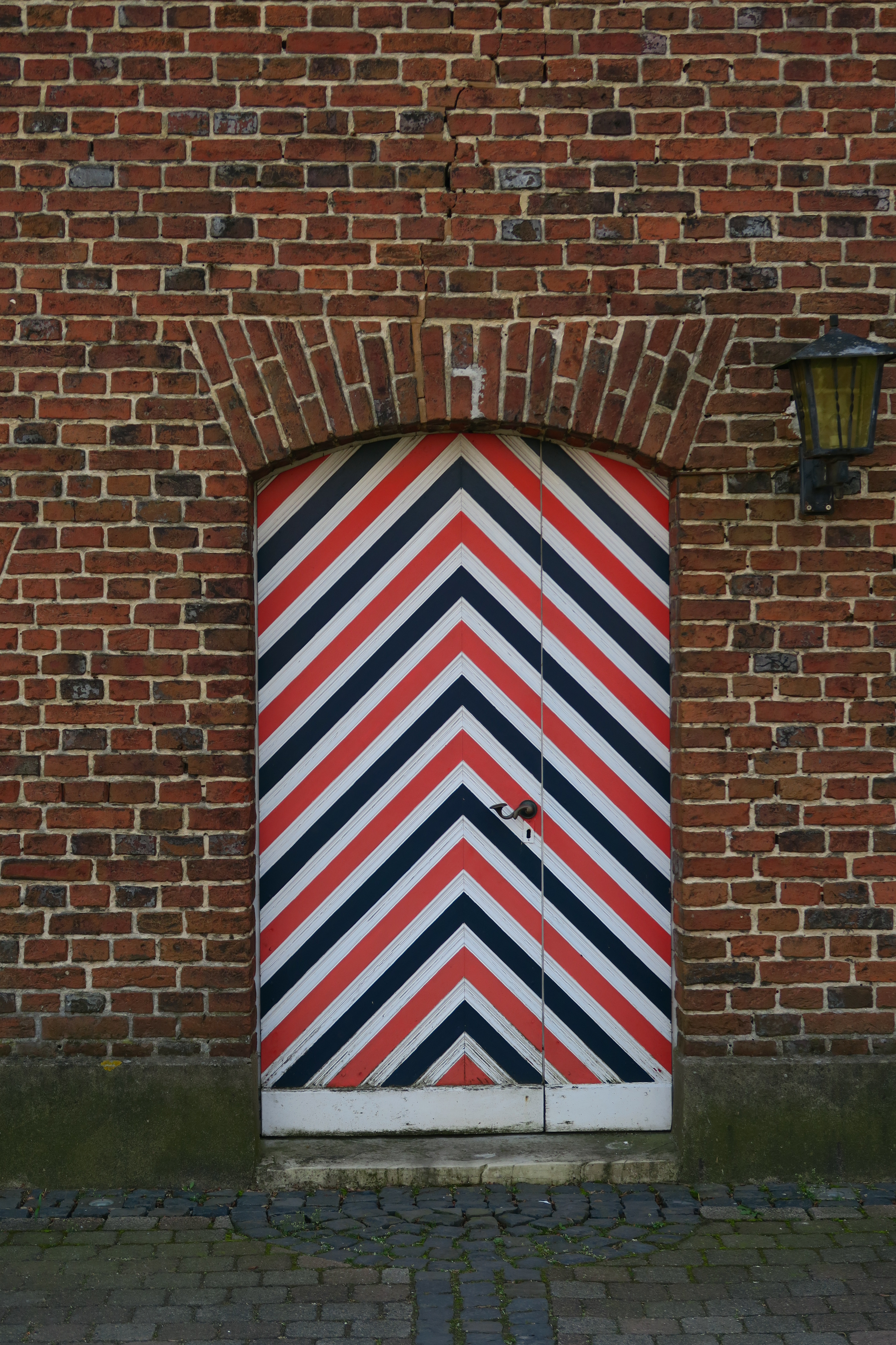 Eingangstür von St. Antonius, Tönnishäuschen, Ahlen